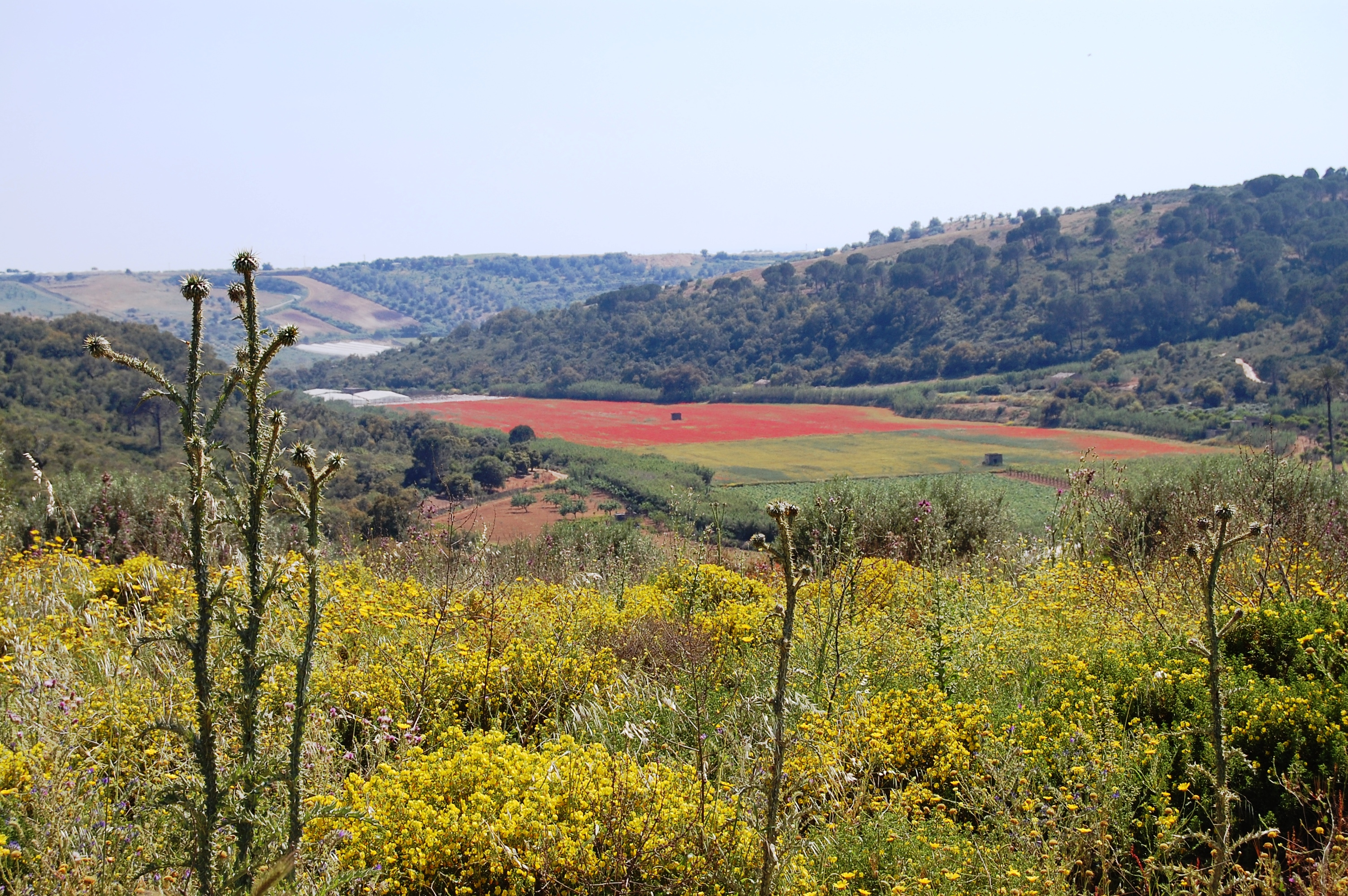 Quercus suber Sughereta di Niscemi